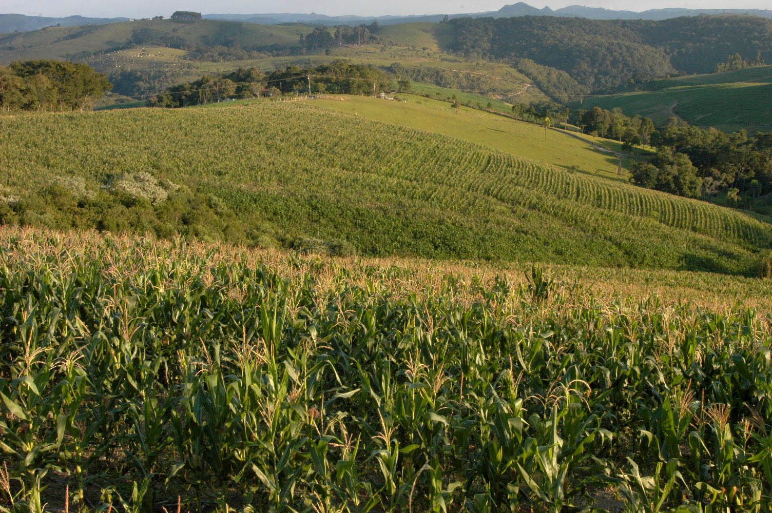 Plantação de milho em Medianeira (PR), Brasil.